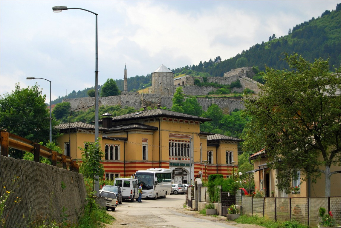 Tvrđava i medresa u Travniku